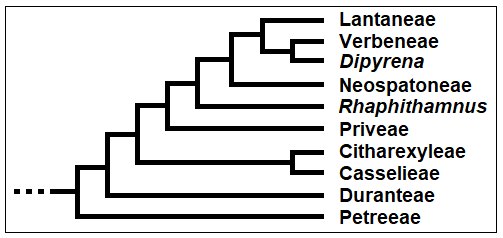 Cladogramma della famiglia Verbenaceae